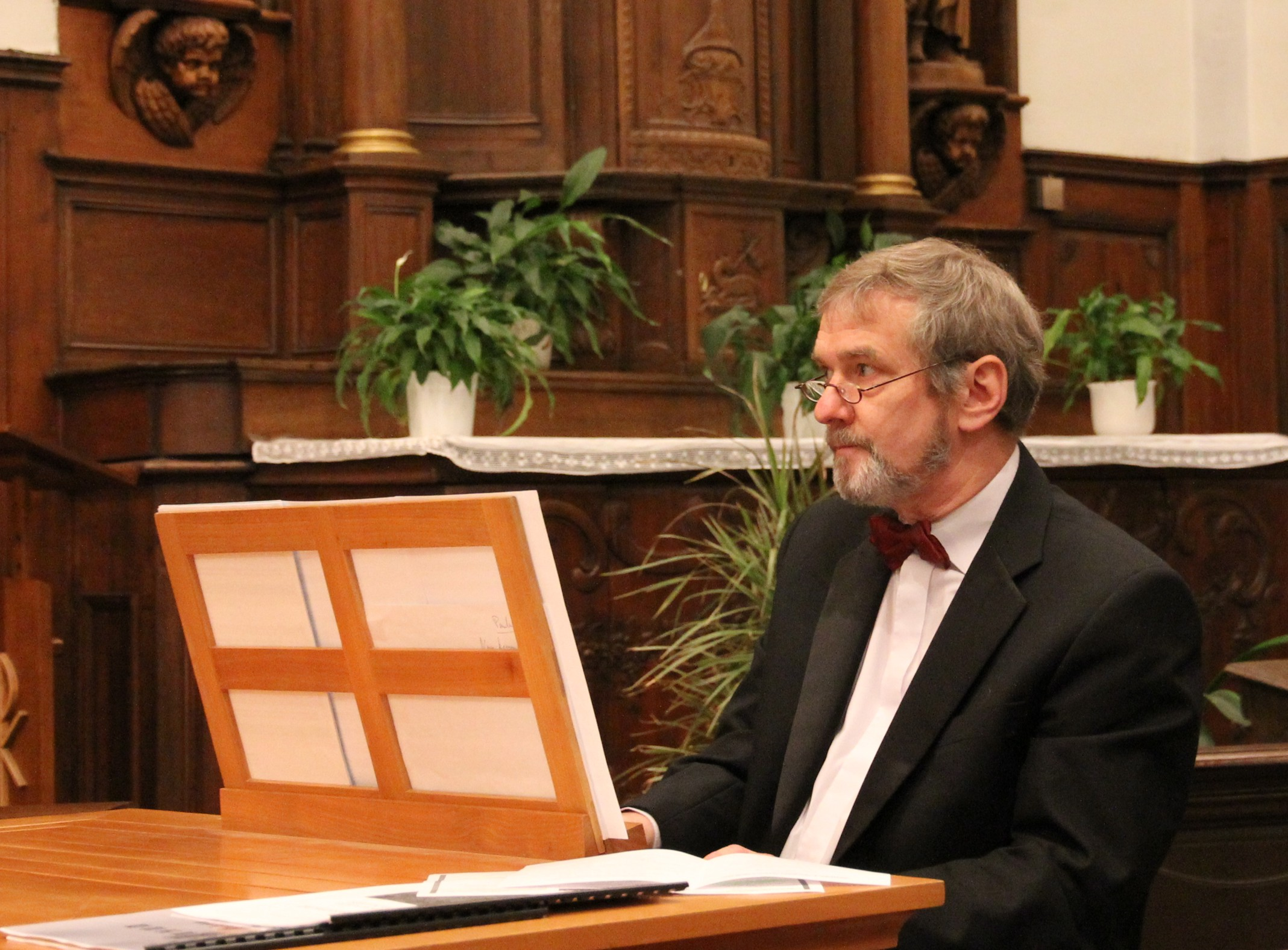 Hans Georg Reinertz als Continuo Begleiter an einer Truhenorgel